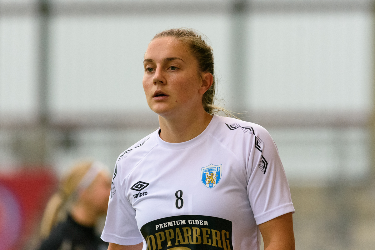 Vilde Bøe Risa at FC Bayern vs Göteborg FC